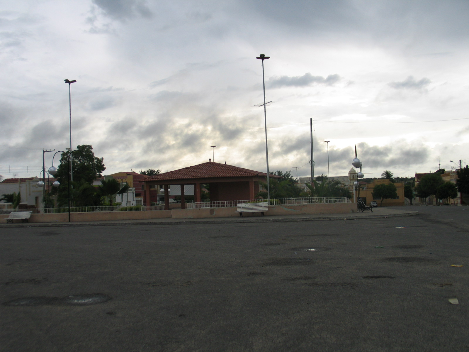 Praça do Centenário